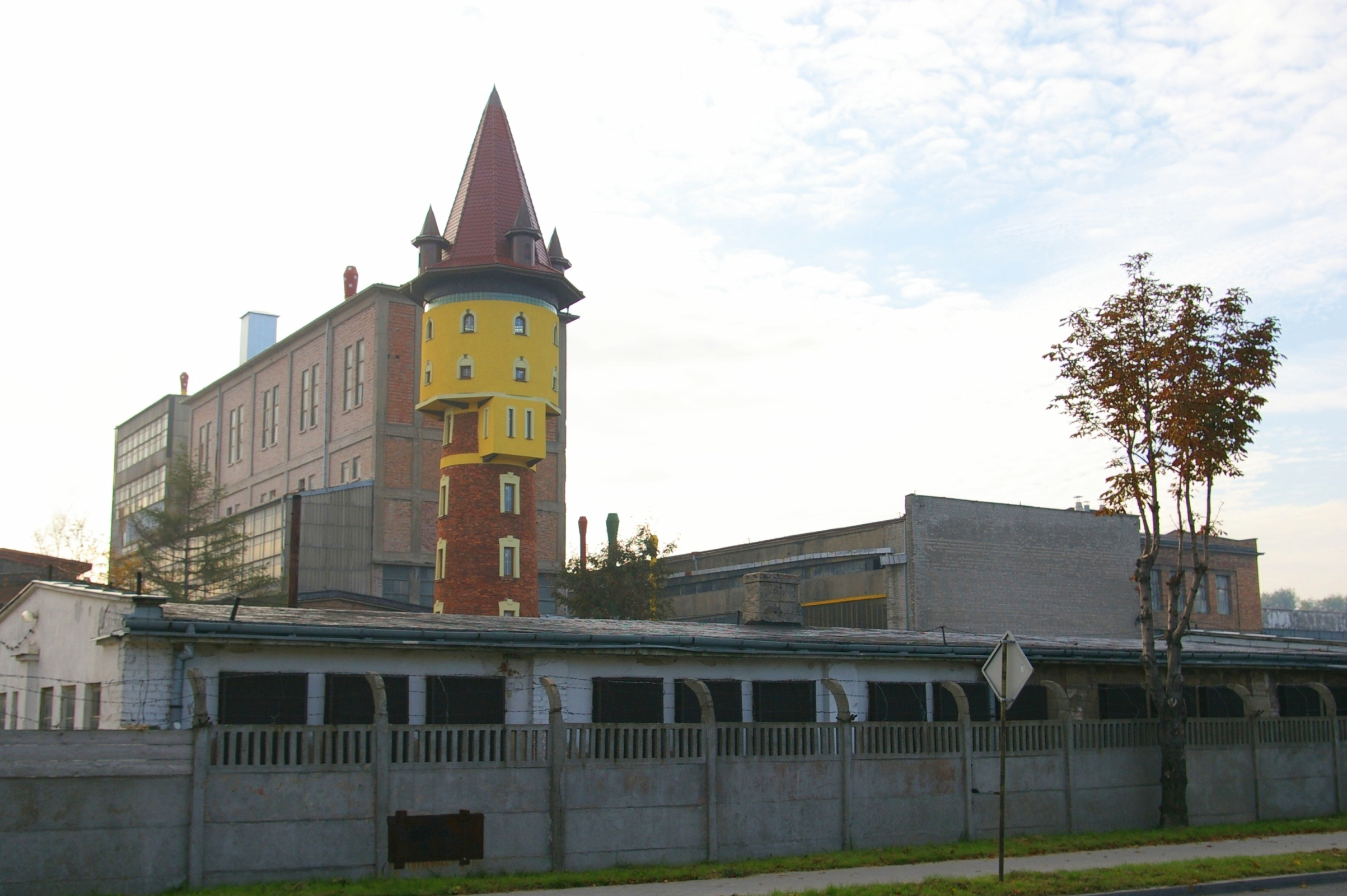 Dawna cegielnia Klepackiego na Ludwikowie w Ostrowcu Świętokrzyskim